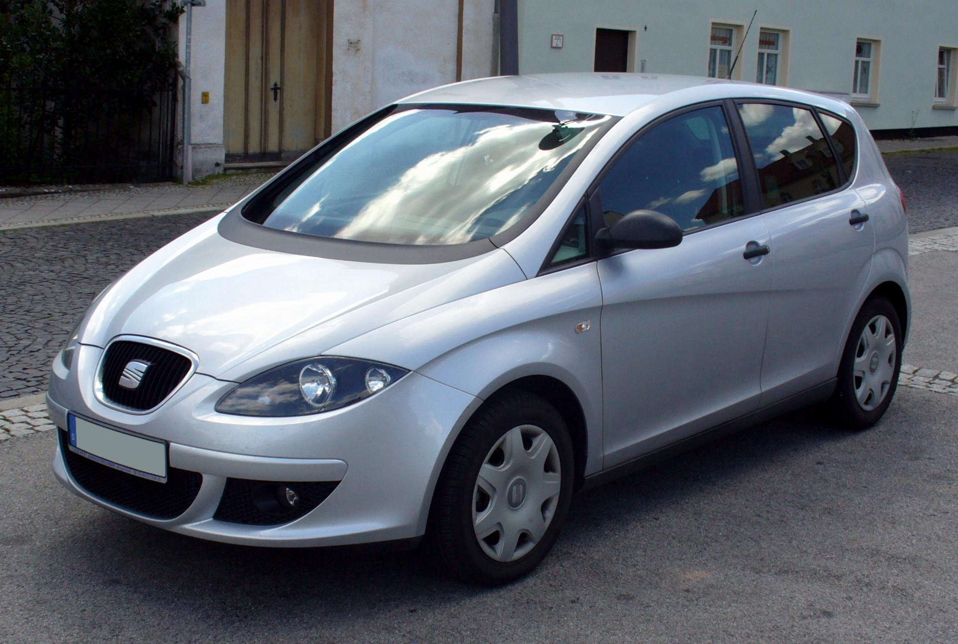 Seat Altea